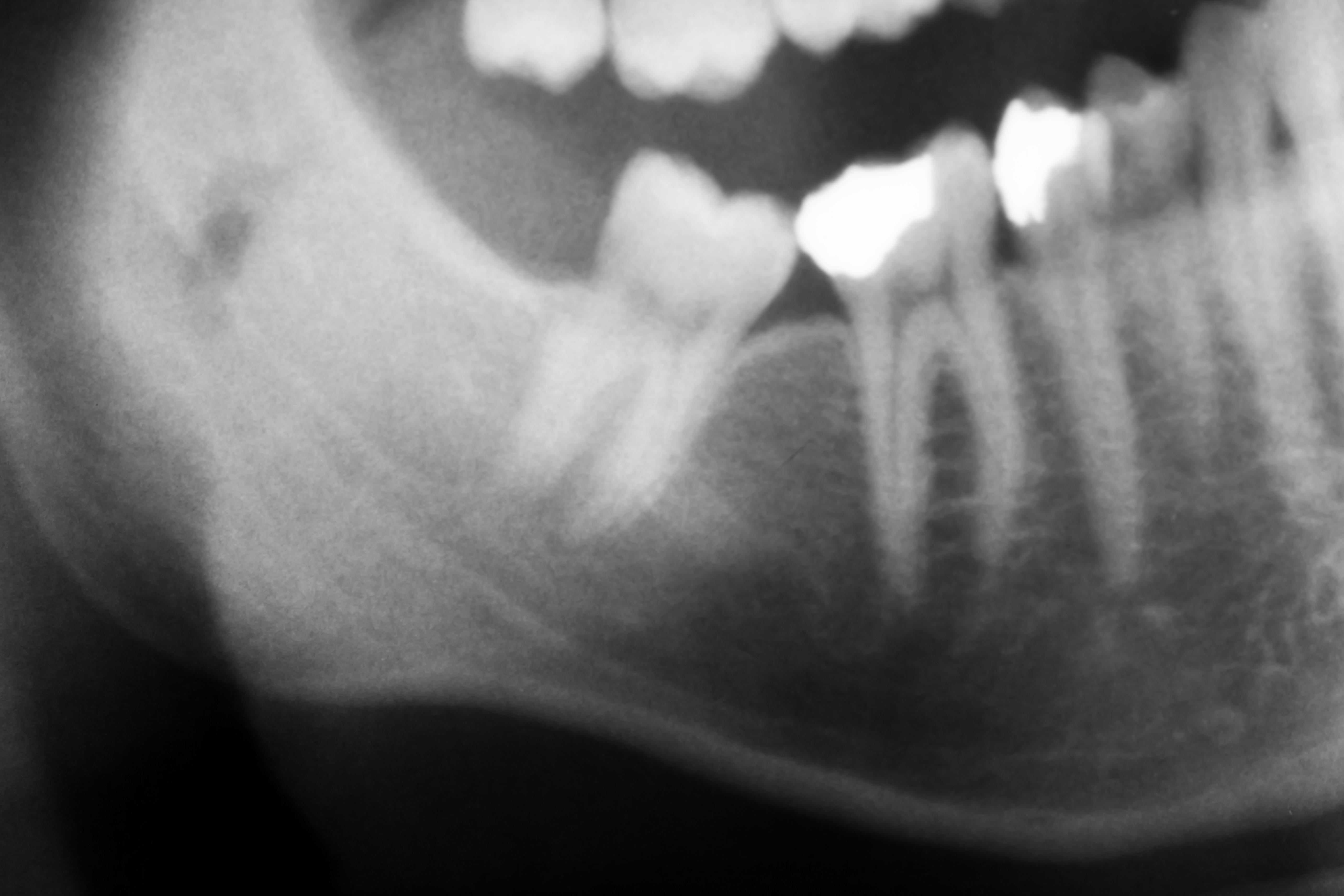 Röntgenbild der Zähne